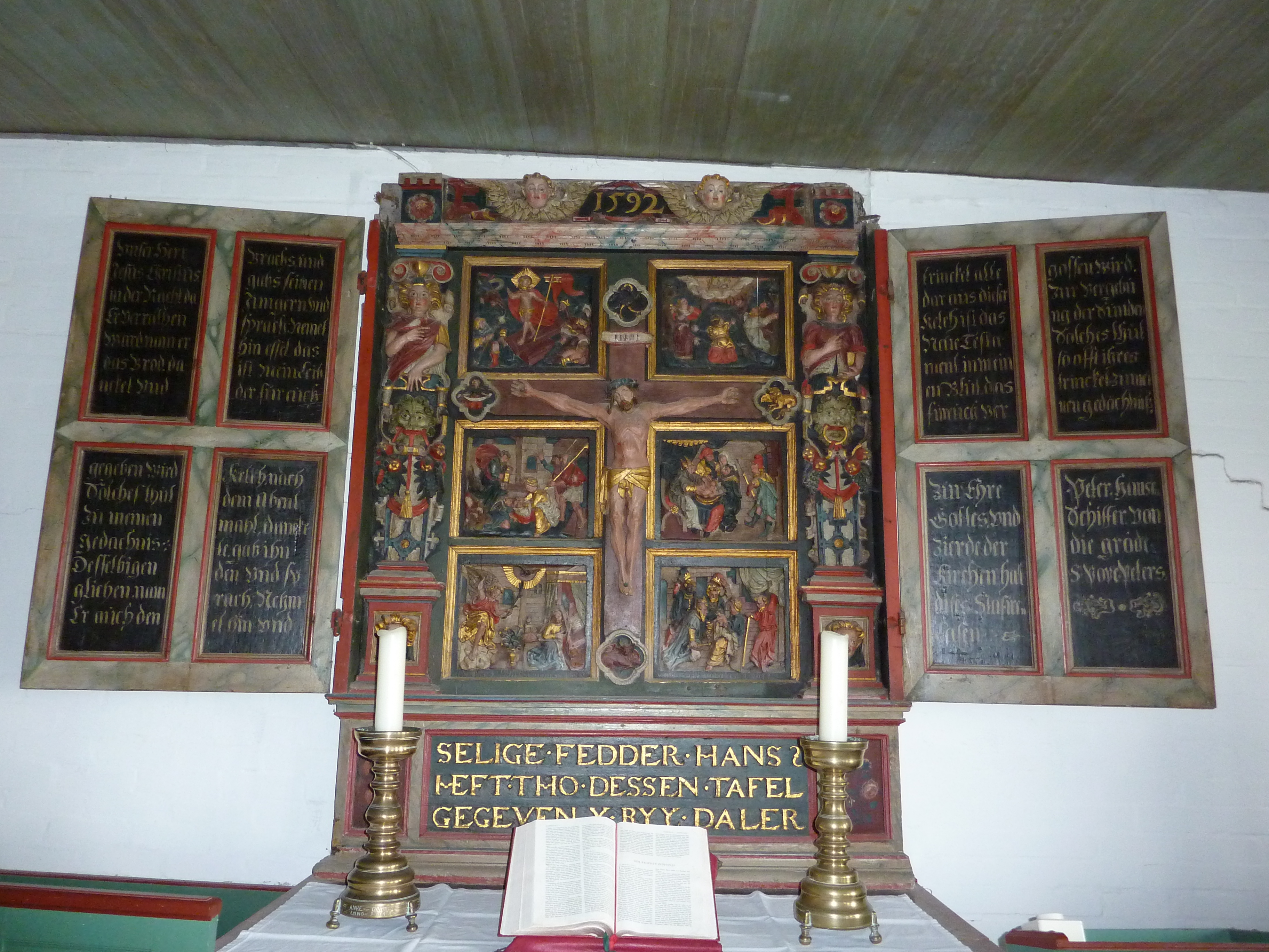 Hallig Gröde, Kirchwarft, Altar in der Halligkirche St. Margarethen, Schleswig-Holstein